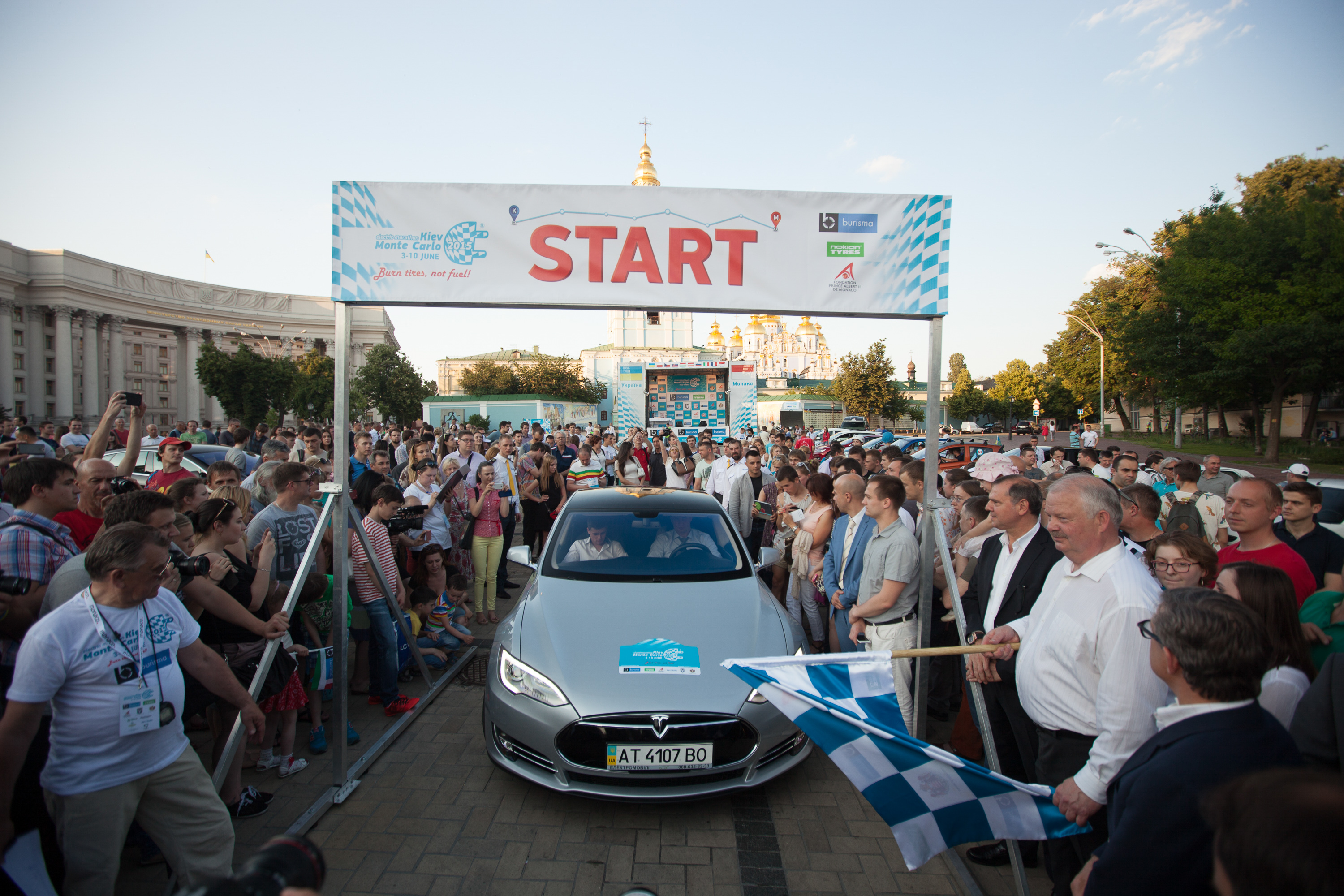 Торжественный старт ралли "Электромобильный Марафон 2015" в Киеве